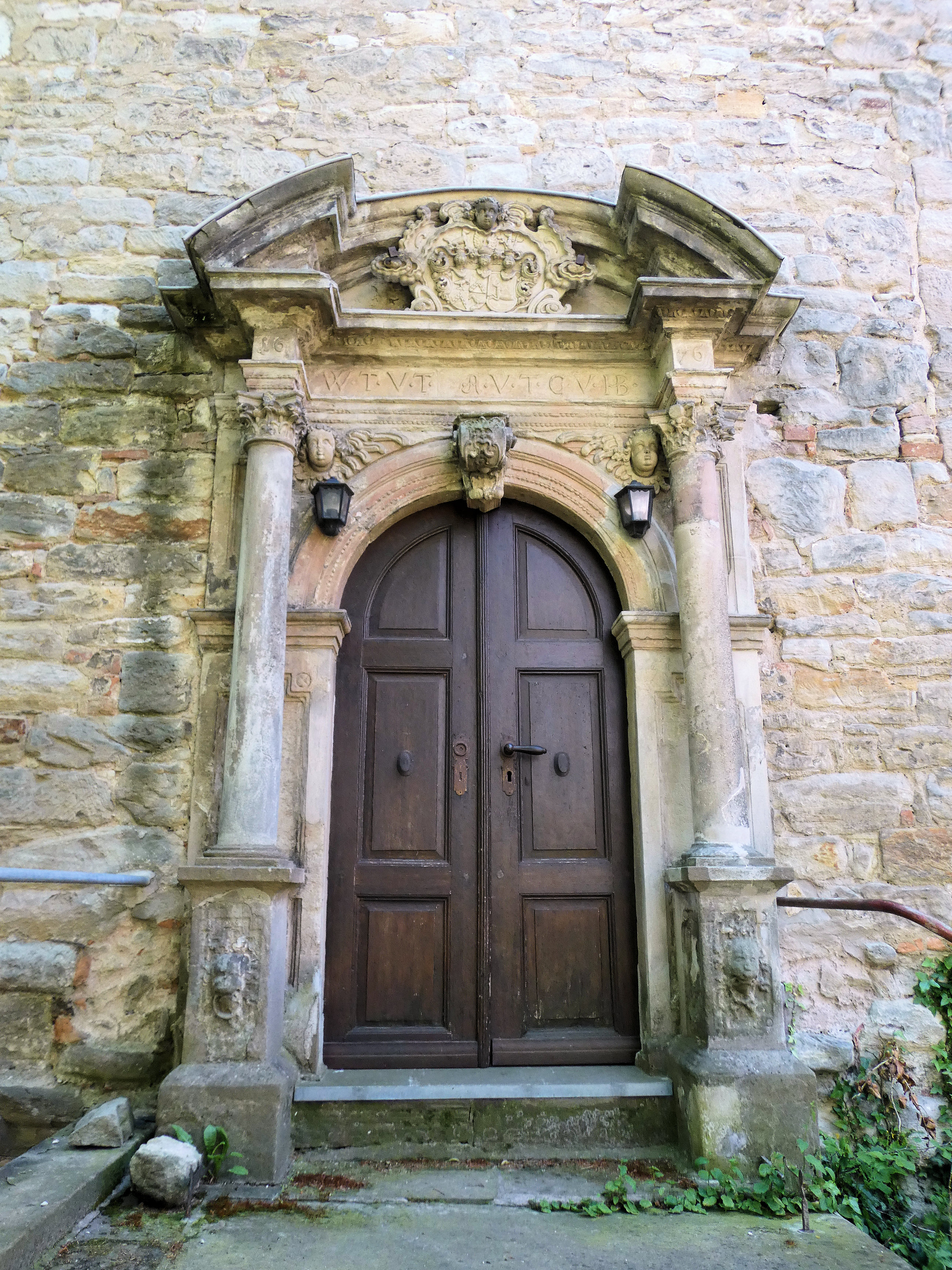 Hauptportal von St. Viti, Teutschenthal